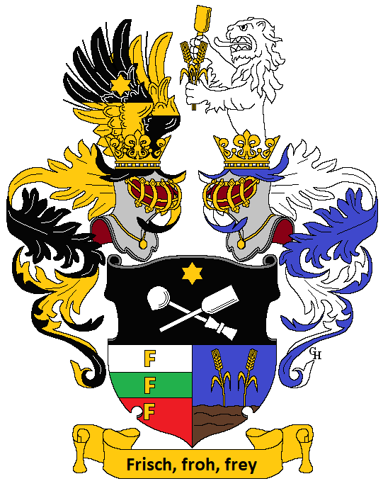 Wappen des deutsch-österreichischen Bildhauers Anton Dominik Fernkorn (1813–1878), verliehen anlässlich seiner Erhebung in den österreichischen Ritterstand 1860. Zeichnung von Gerd Hruška ( Für weitere Informationen zu dieser Standeserhebung siehe (